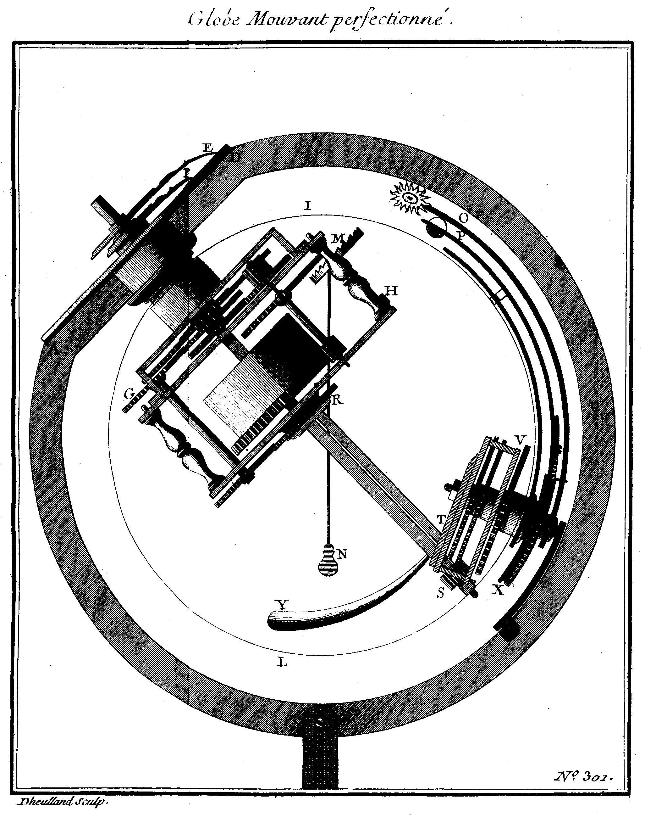 Représentation du globe mouvant d'Outhier présenté en 1731 à l'Ac. des sciences de Paris.